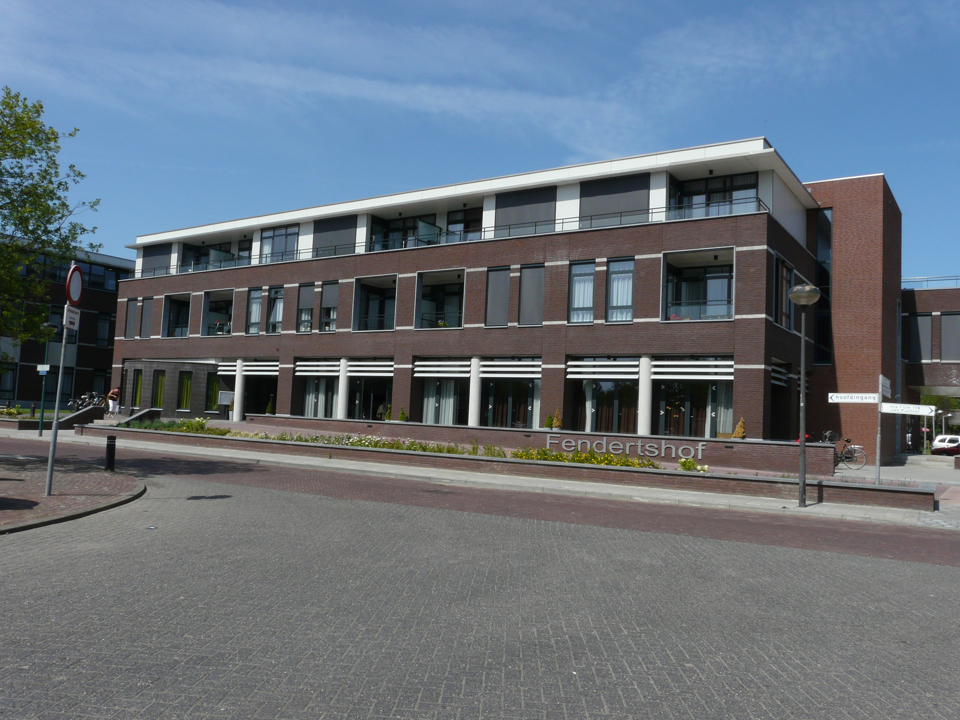 Zicht op een deel van de Surplus, Locatie Fendertshof, Kerkring 21, 4793 ES Fijnaart